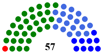 Composicion del Parlamento costarricense en ese periodo